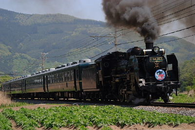 秩父鉄道 樋口 - 野上にて C58363「SLパレオエクスプレス号」